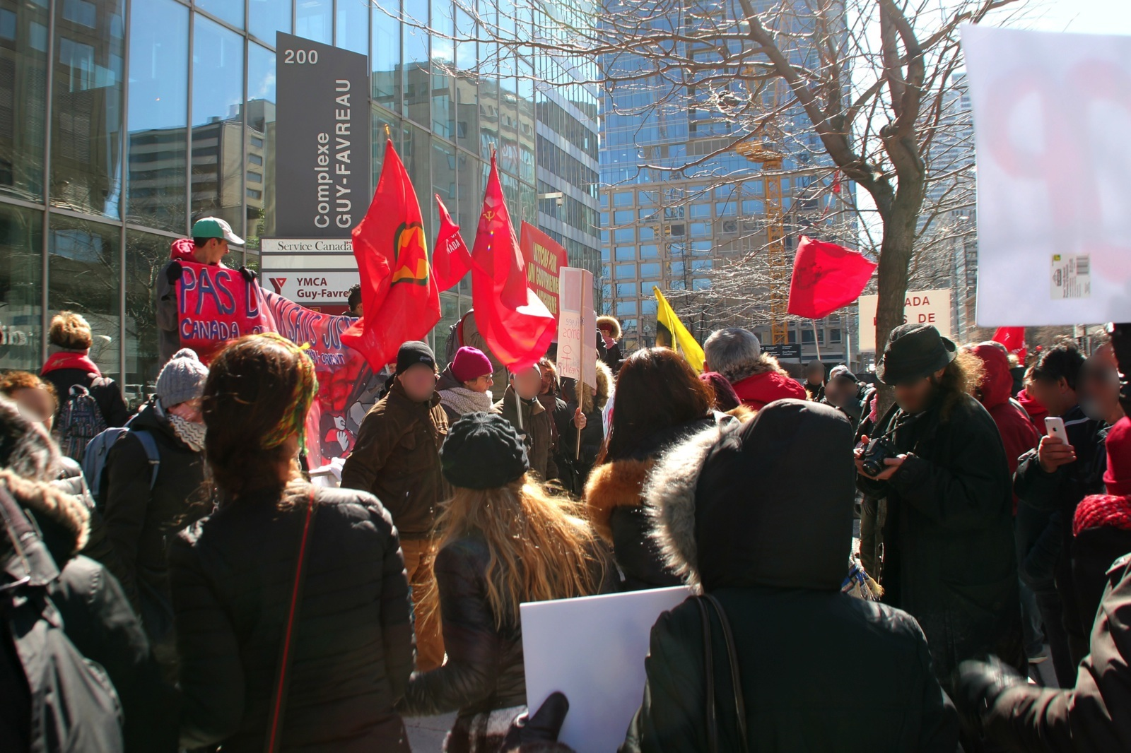 Manifestation Montréal pour la Paix du 19 mars 2016 au Complexe Guy-Favreau